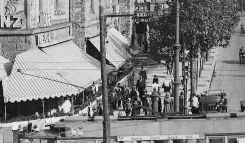 Blick von der Hardenbergstraße auf die Ausstellungshallen am Zoo, die Kaiser-Wilhelm-Gedächtniskirche und das Erste Romanische Haus mit dem Gloria-Palast in Berlin-Charlottenburg.